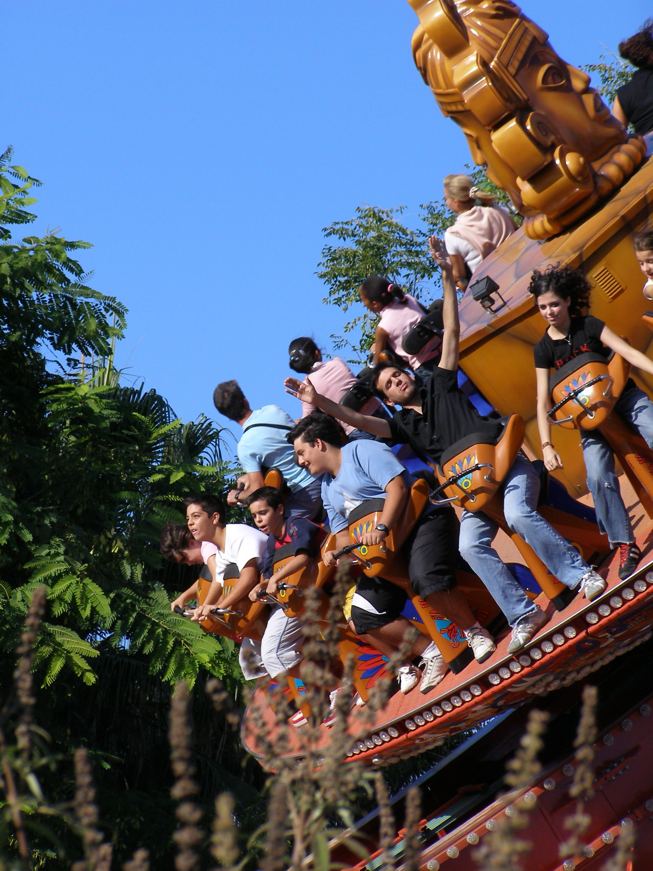 Atracción en Isla Mágica, el parque temático